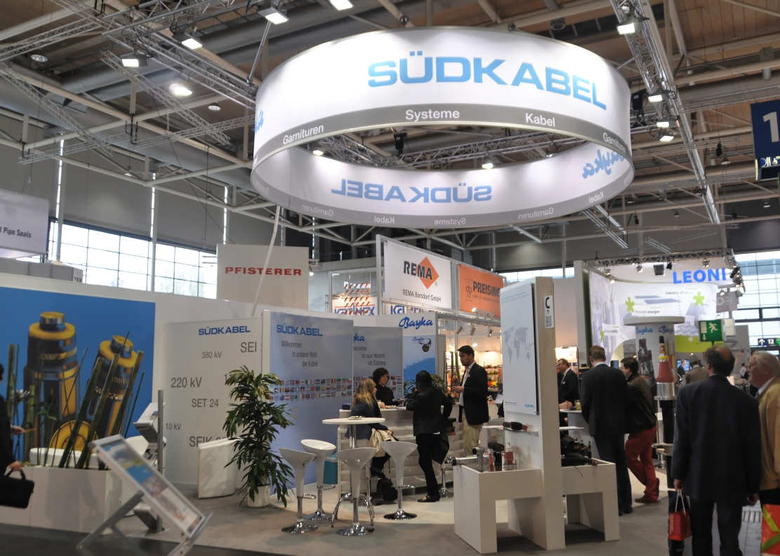 Hannover-Messe April 2012 Dieses Foto entstand durch die Mithilfe des gemeinnützigen Vereins Skillshare bei der Akkreditierung als Fotograf. Infos unter skillshare.eu Skillshare e.V. ist ein eingetragener gemeinnütziger Verein zur Förderung der Bildung durch Unterstützung der Erstellung, Sammlung und Verbreitung so genannten freien Wissens. IBAN: DE16 8306 5408 0004 8850 66 BIC: GENODEF1SLR Bank: VR-Bank Altenburger Land